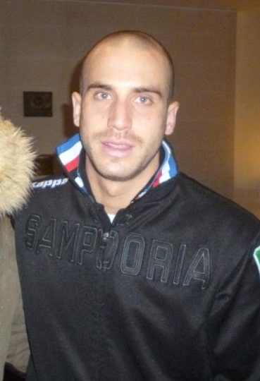 Lorenzo De Silvestri prima dell'incontro di Serie A, Siena-Sampdoria del 20 gennaio 2013.